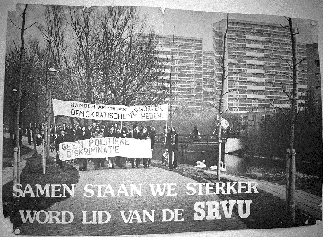 zelf gemaakt